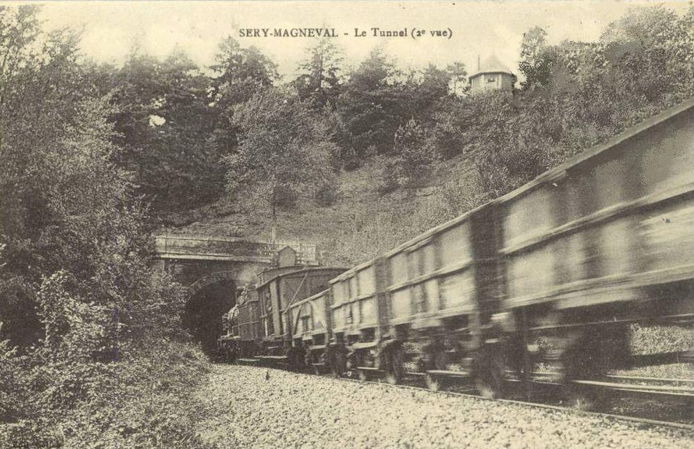 Un train de marchandises entre dans le souterrain de Séry, sur la ligne d'Ormoy-Villers à Boves. Les tombereaux sont principalement affectés au transport de charbon en provenance des houillères du Nord.